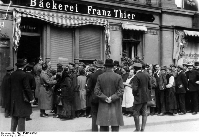 Inflation.- Berlin, ca. 1923 Polizeiabsperrung beim Brotverkauf.